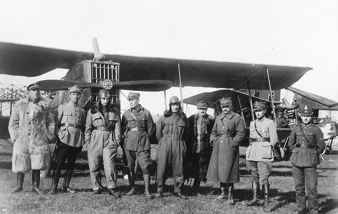 Personel latający 16 eskadry wywiadowczej na lotnisku w Lidzie - pażdziernik 1920 r. Podporucznik obserwator Józef Mickiewicz pierwszy z lewej.